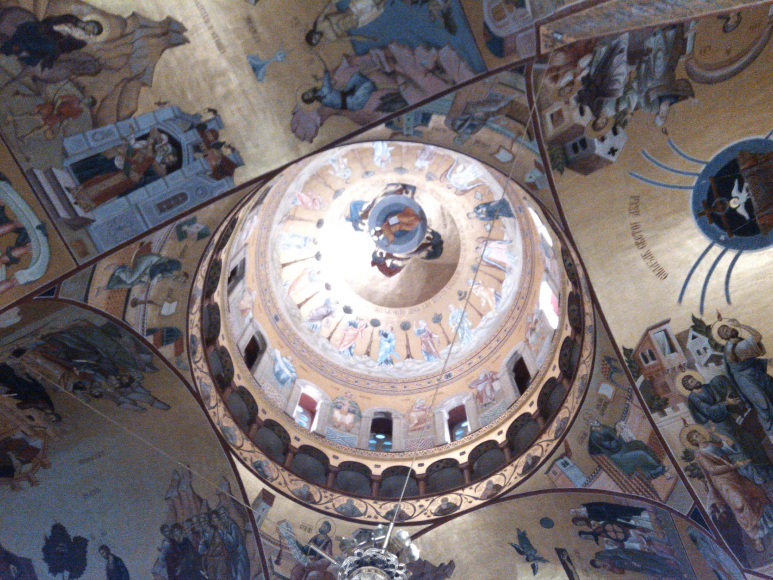 Novi Grad, Podgorica, Montenegro